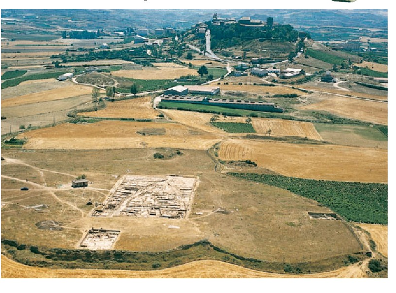 La Hoyako bizilekuaren irudiak, Biasterin (Araba)